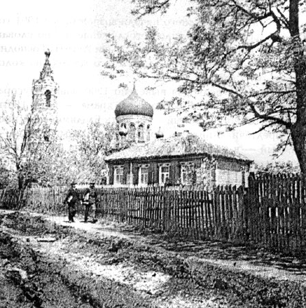 Преображенский храм в хуторе Обуховка, Ростовский округ Области Войска Донского.